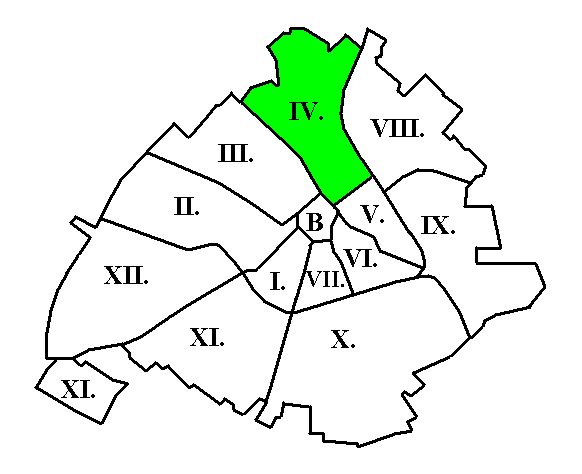 Kecskemét IV. kerülete